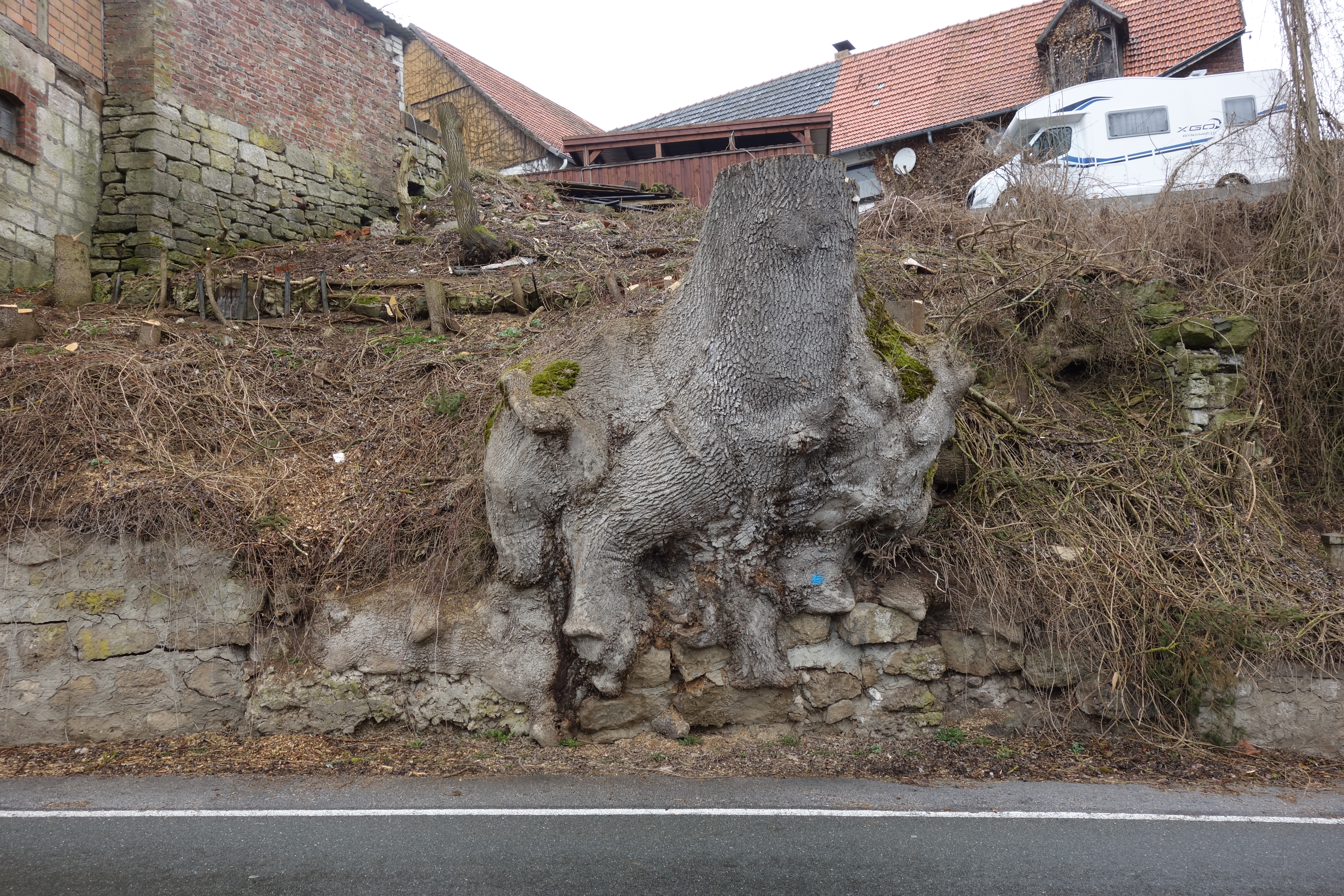 Baumstumpf vom Naturdenkmal 154 Esche nach Fällung. Die 500 Jahre alte Esche in Obermarsberg lag an der alten Stadtmauer.